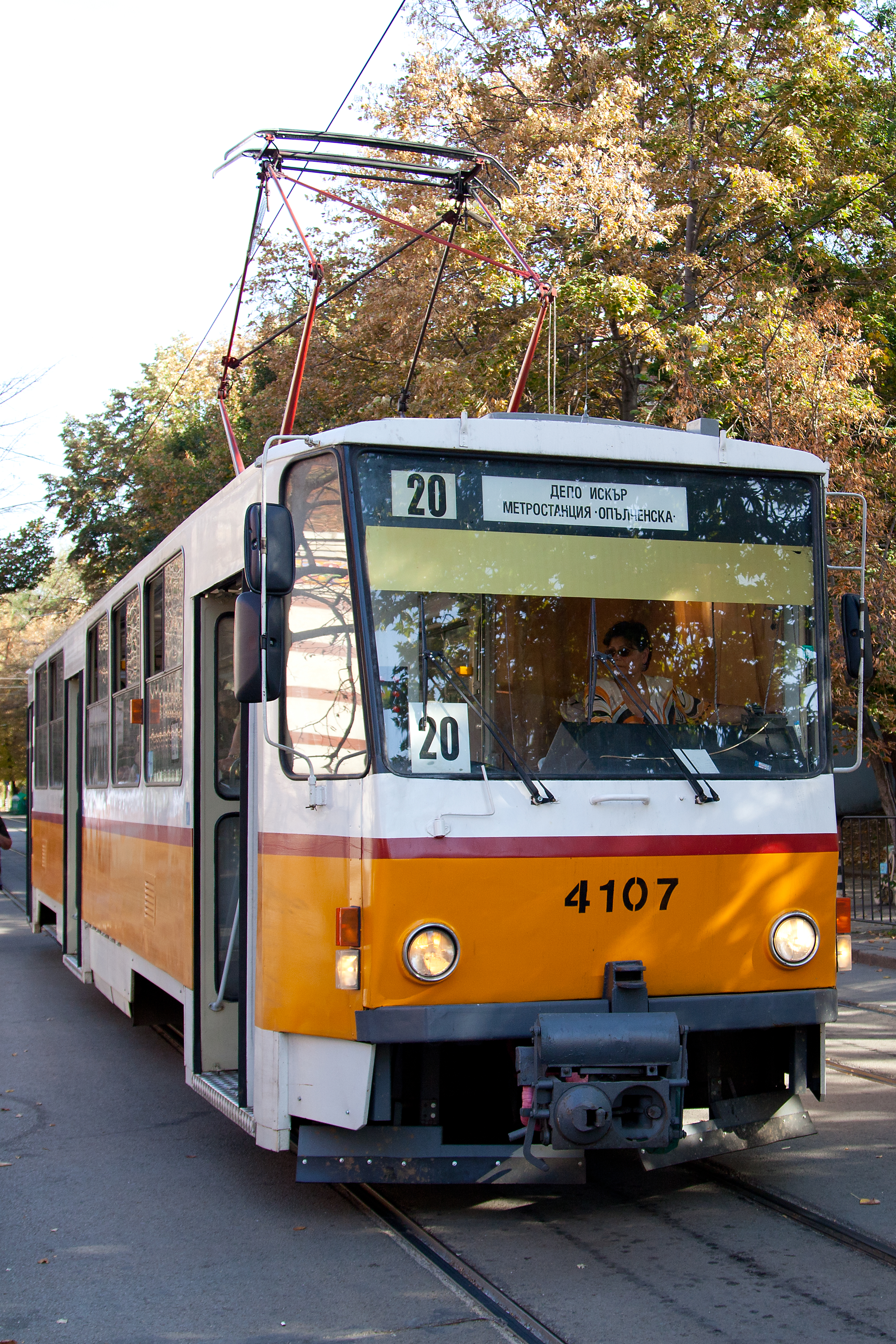 Straßenbahn in Sofia